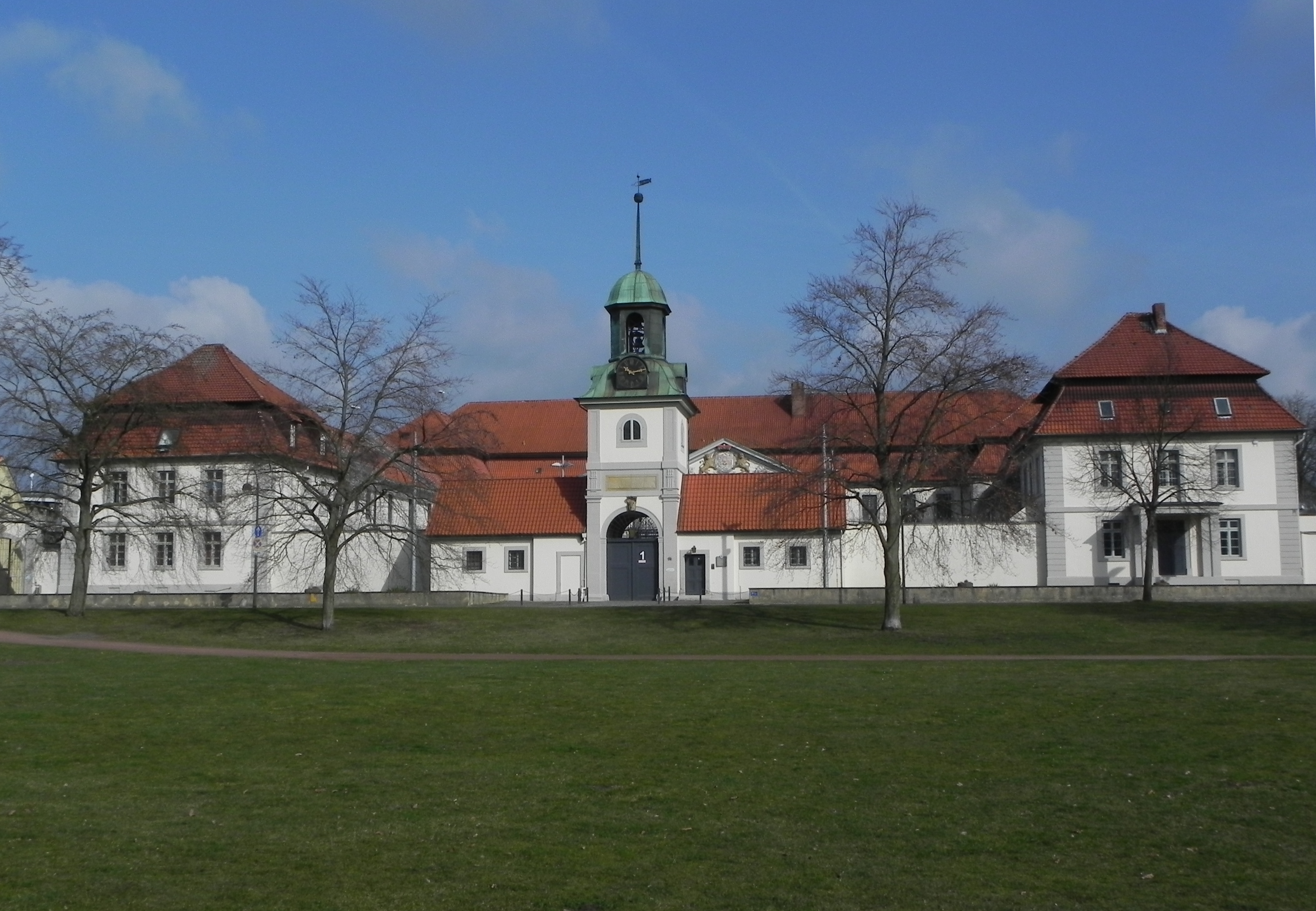 Torgebäude der 1710-24 erbauten "Anstalt", heute JVA Celle